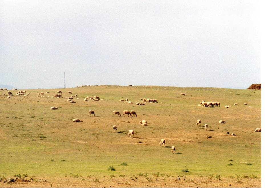 Ovejas pastando en la Tiesa de la Sevillana